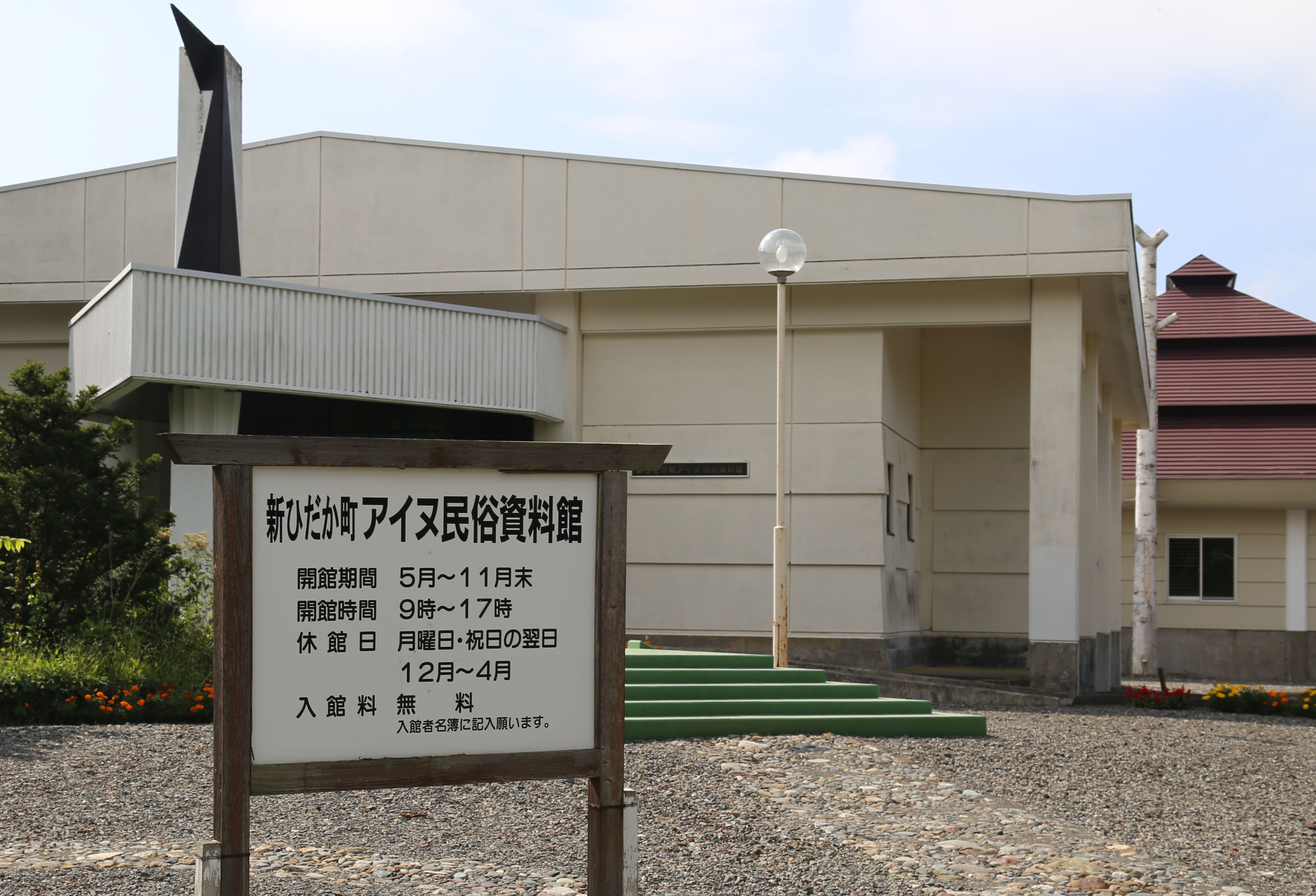 新ひだかアイヌ資料館